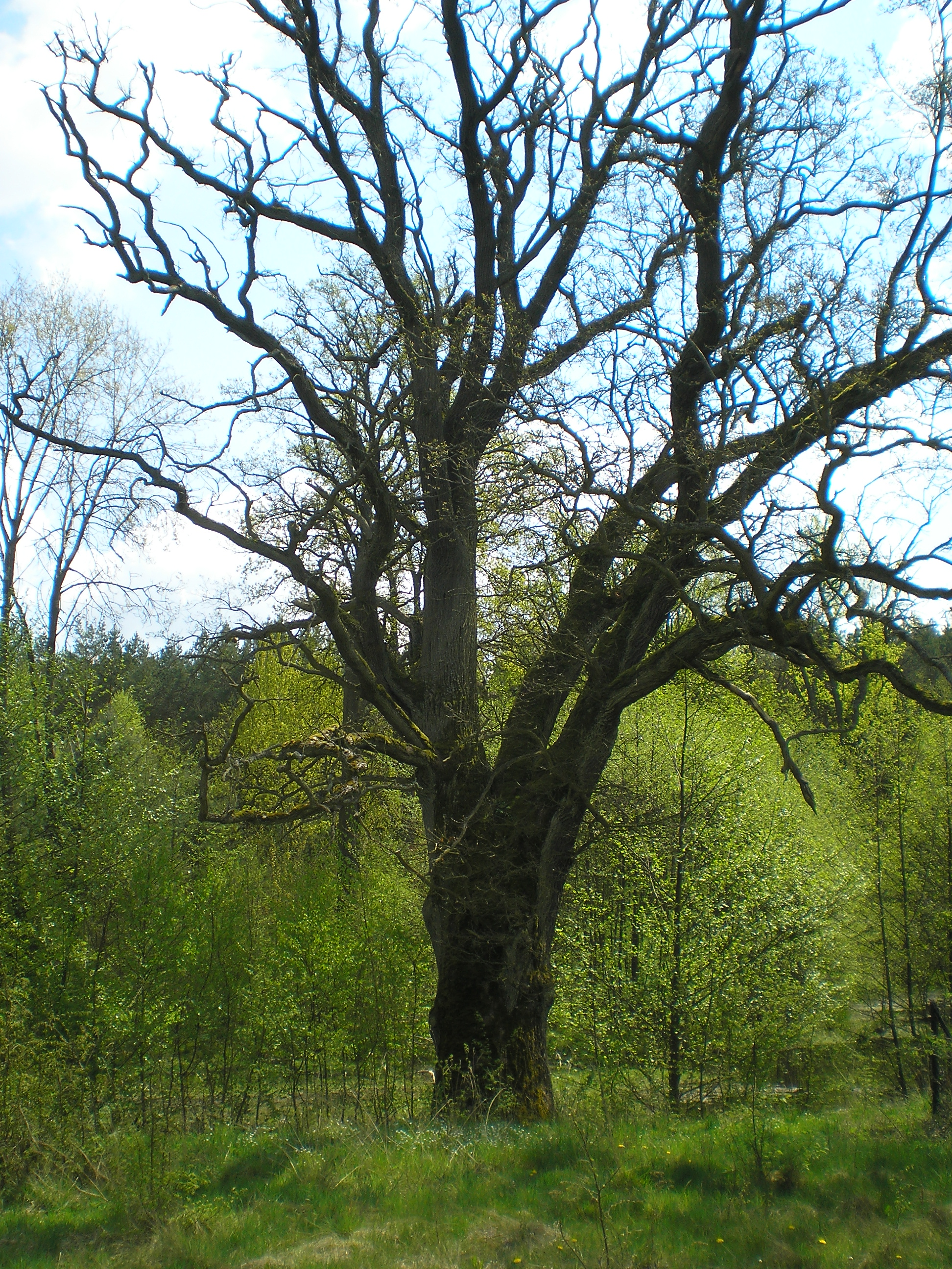 Pomnikowy dąb szypułkowy nad stawem w Kłodnicy